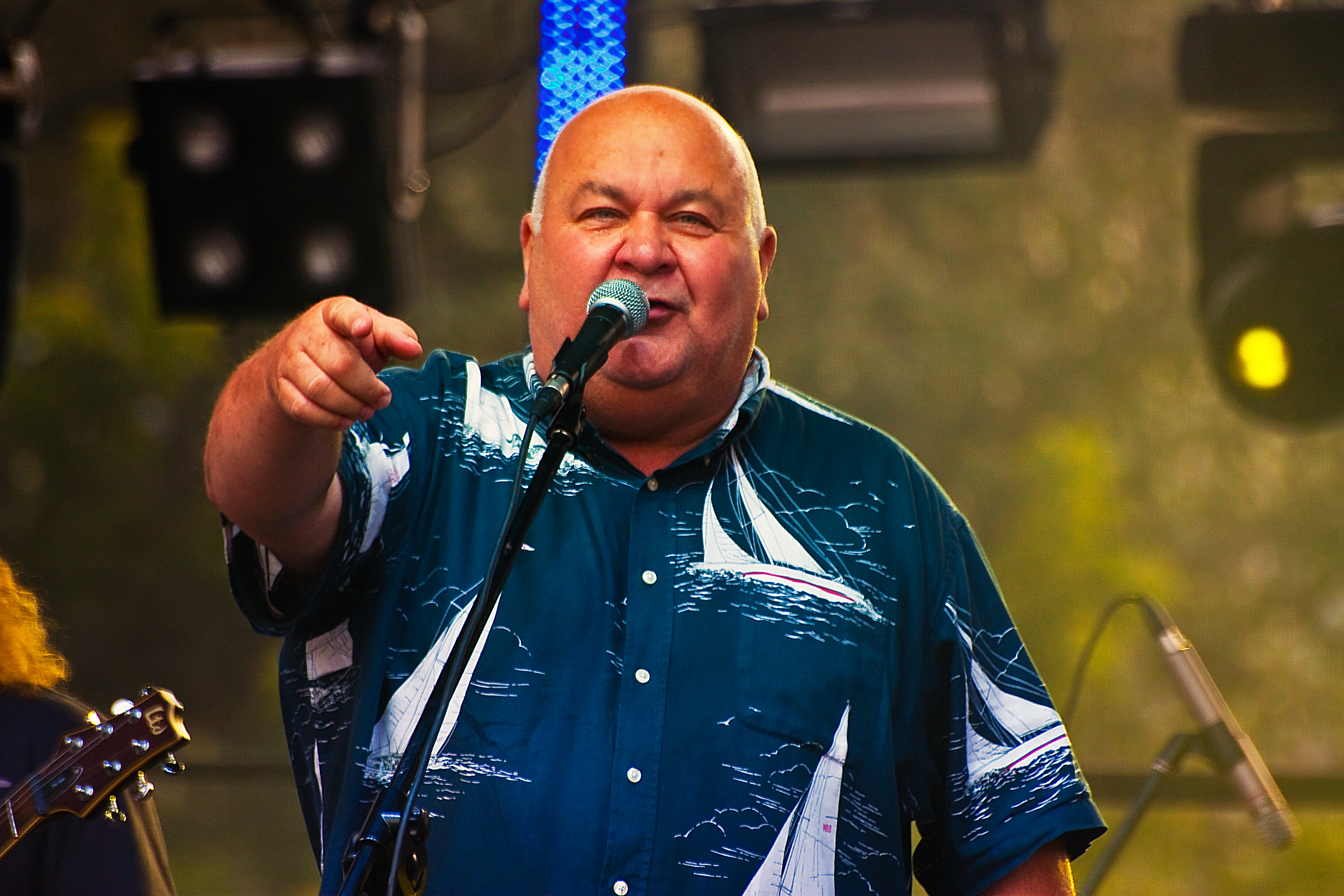 Rudi Schuberth. Muzyk - wokalista, członek grupy "Wały Jagielońskie".